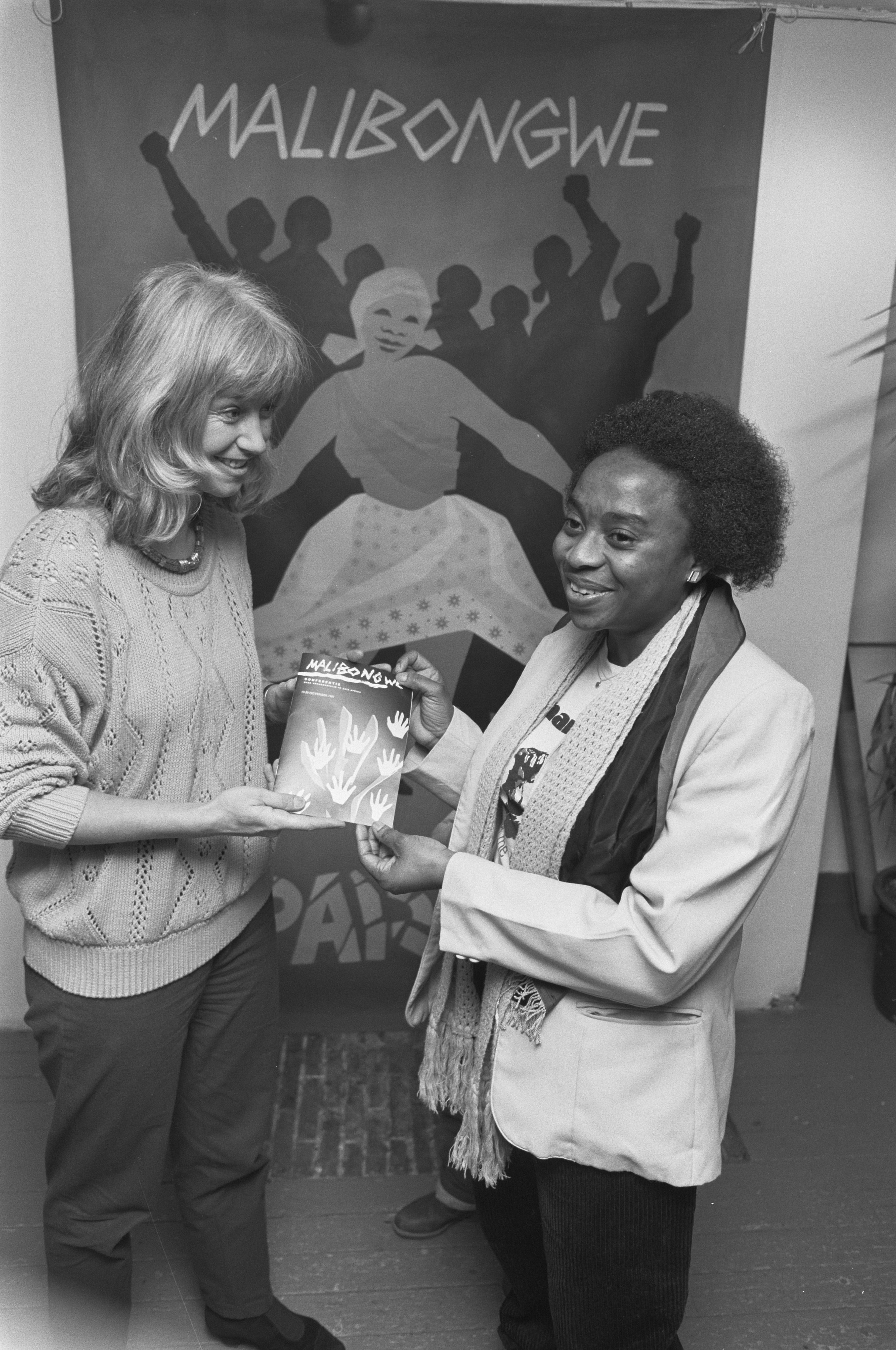 Conny Braam (links) overhandigt de brochure "Nalibongwe" aan Mavivi Manzini van het Afrikaans Nationaal Congres. Datum 1 februari 1989